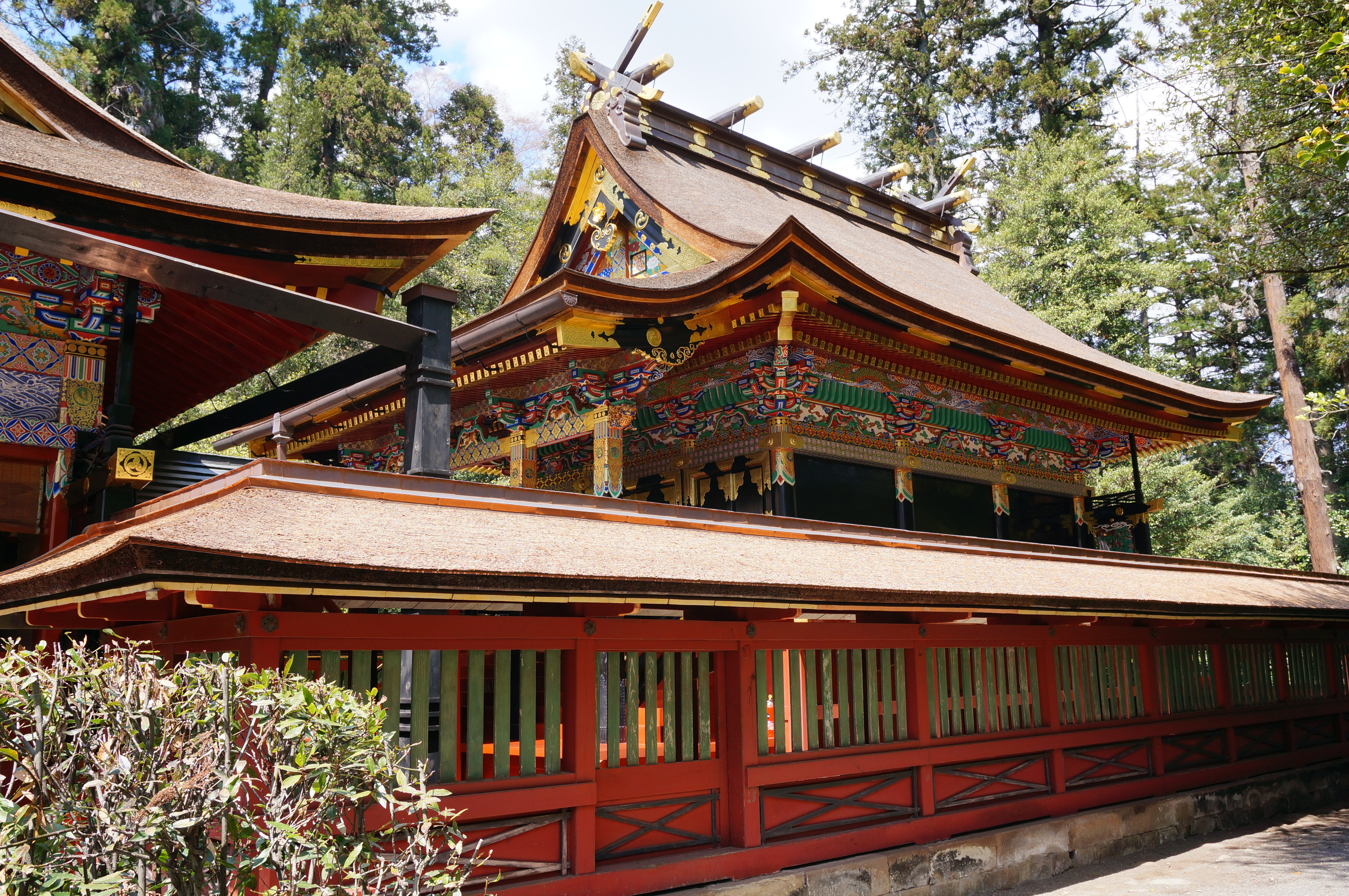 貫前神社本殿